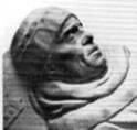 Anton Galeazzo Bentivoglio, figlio di Giovanni I